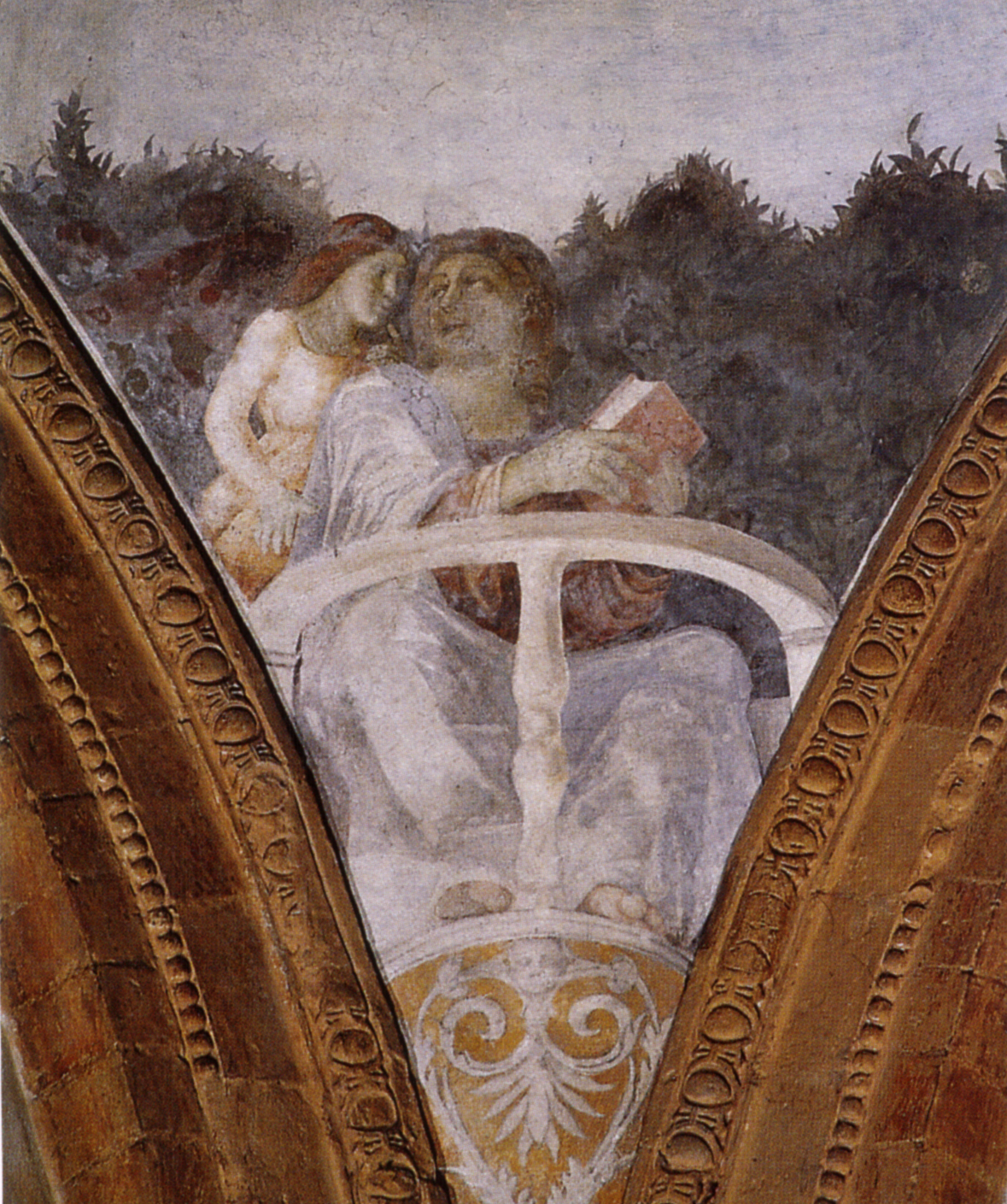 Correggio, cappella funeraria del mantegna, evangelista matteo